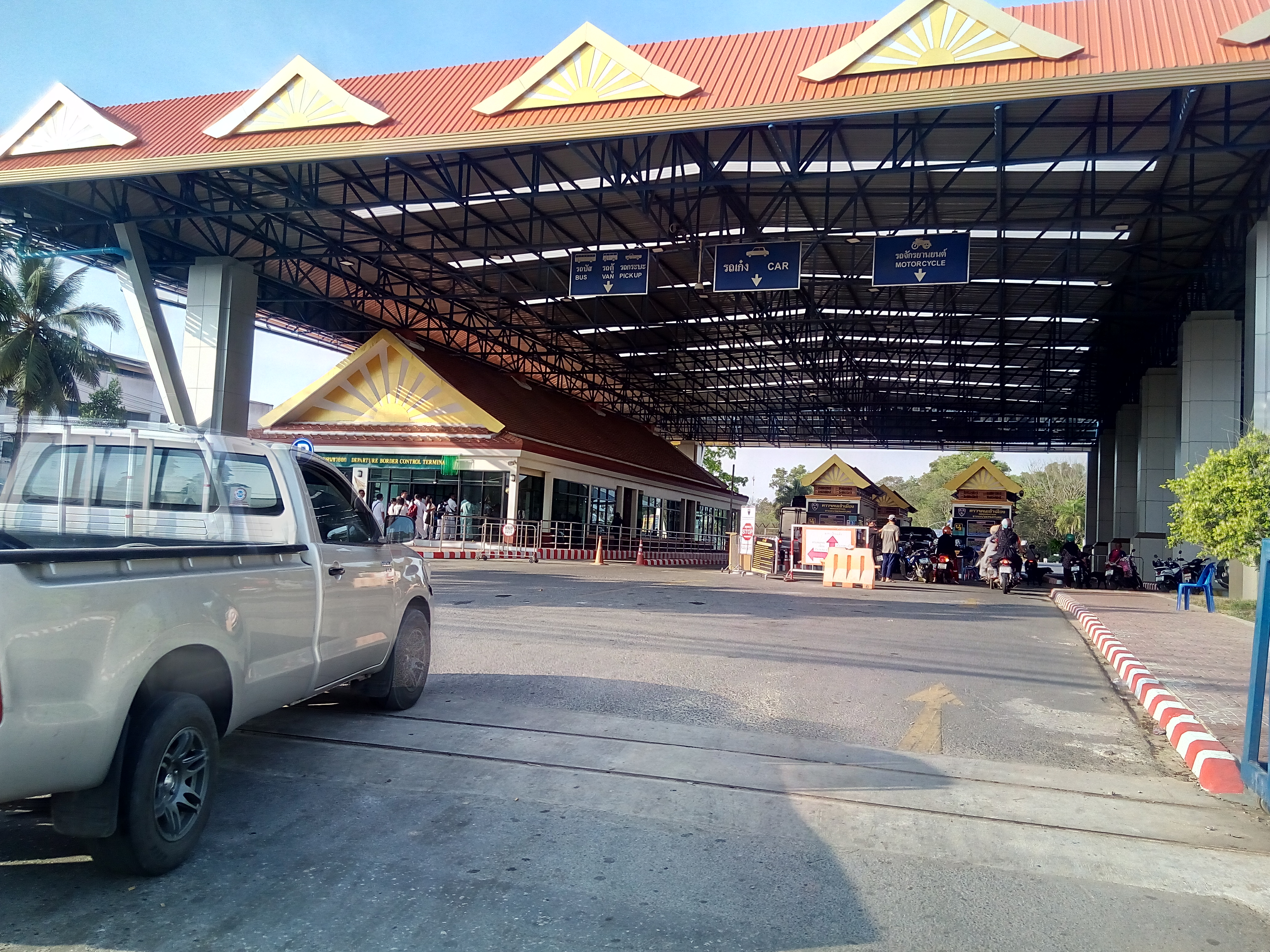 パダンブサールのタイ側国境ゲート